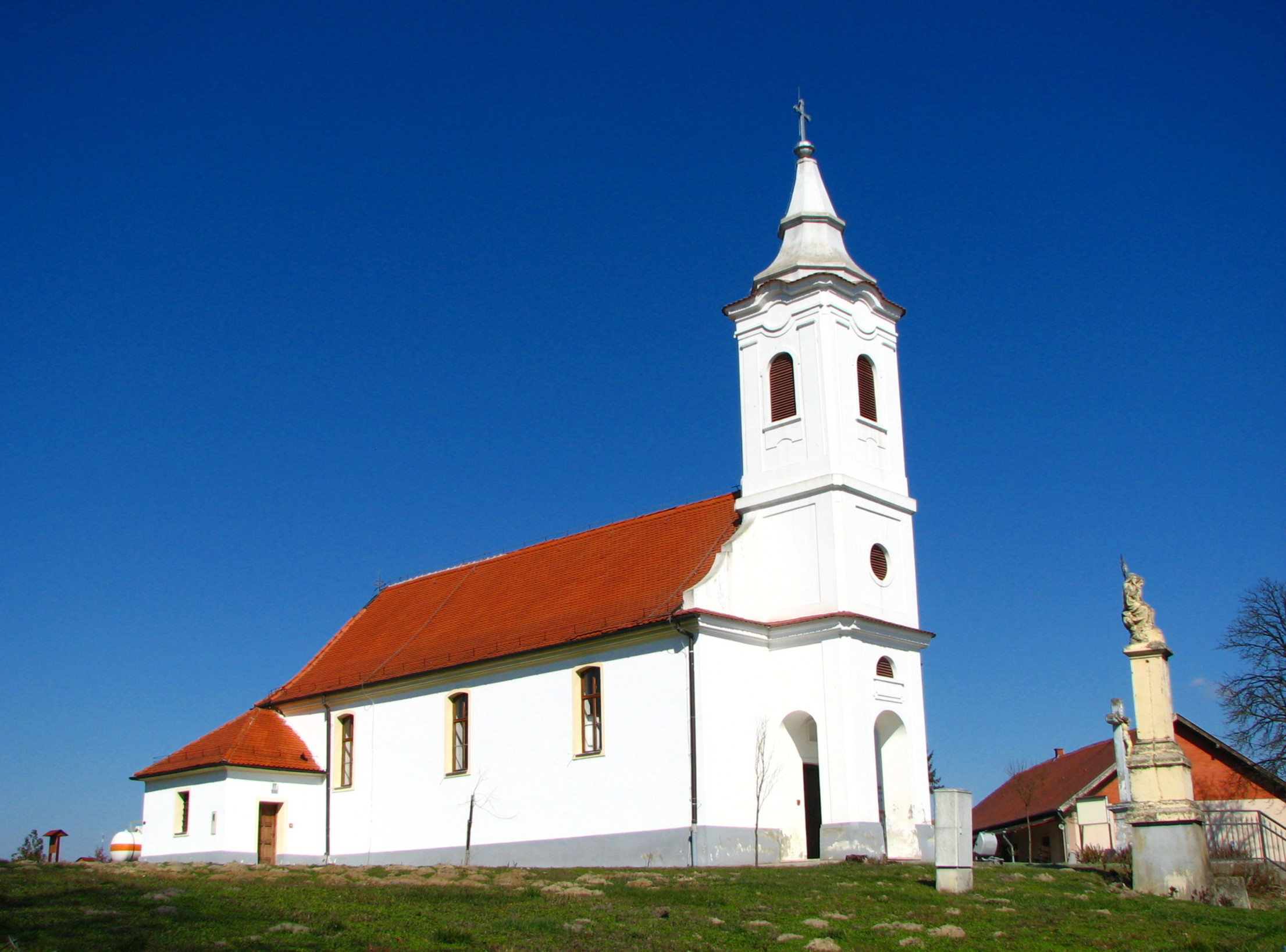 Римокатоличка црква у Кнежевим Виноградима, Аутор: Бранко Тодоровић